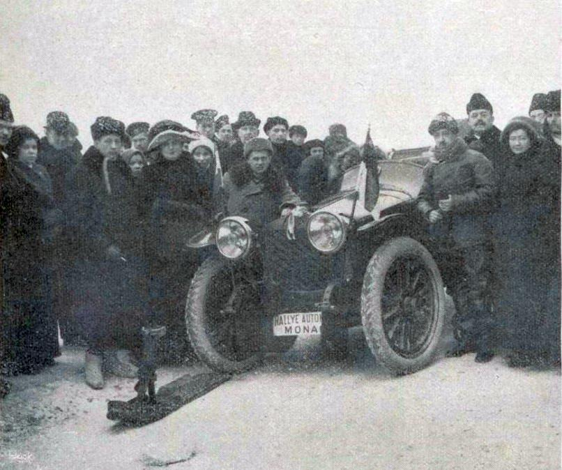 Le départ d'Andrei Nagel à Saint-Petersbourg (rallye Monte-Carlo 1912).